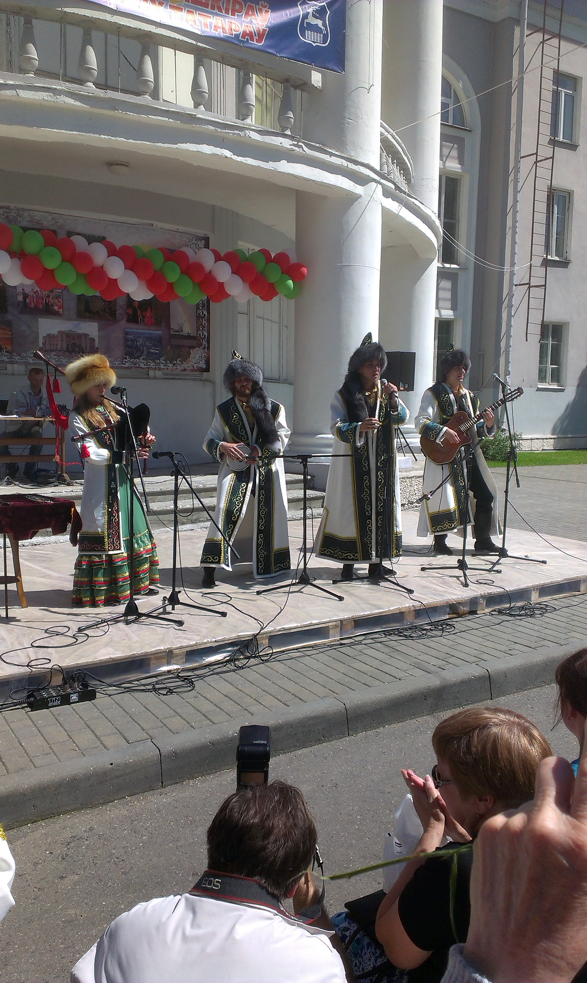 Крымскататарскі падворак на X Рэспубліканскім фестывале нацыянальных культур